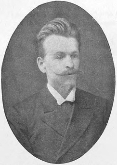 Монтеверде, Николай Августинович